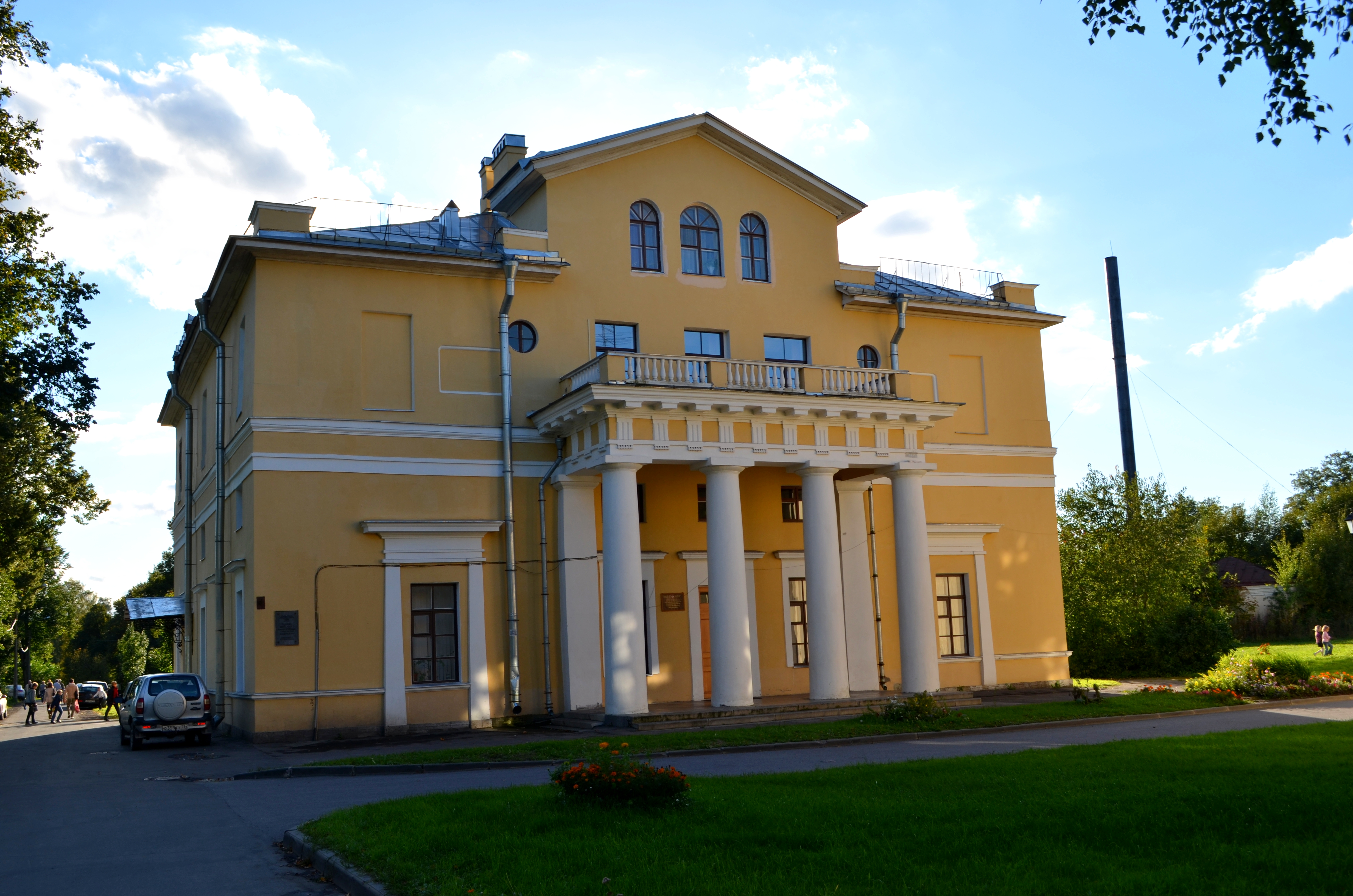 Богадельня (Инвалидный дом) Куракиных - ДДТ "Павловский" 1820-1825 - арх. Адамини Л. Ф., 1840-е - арх. Потолов И. Я. - перестройка